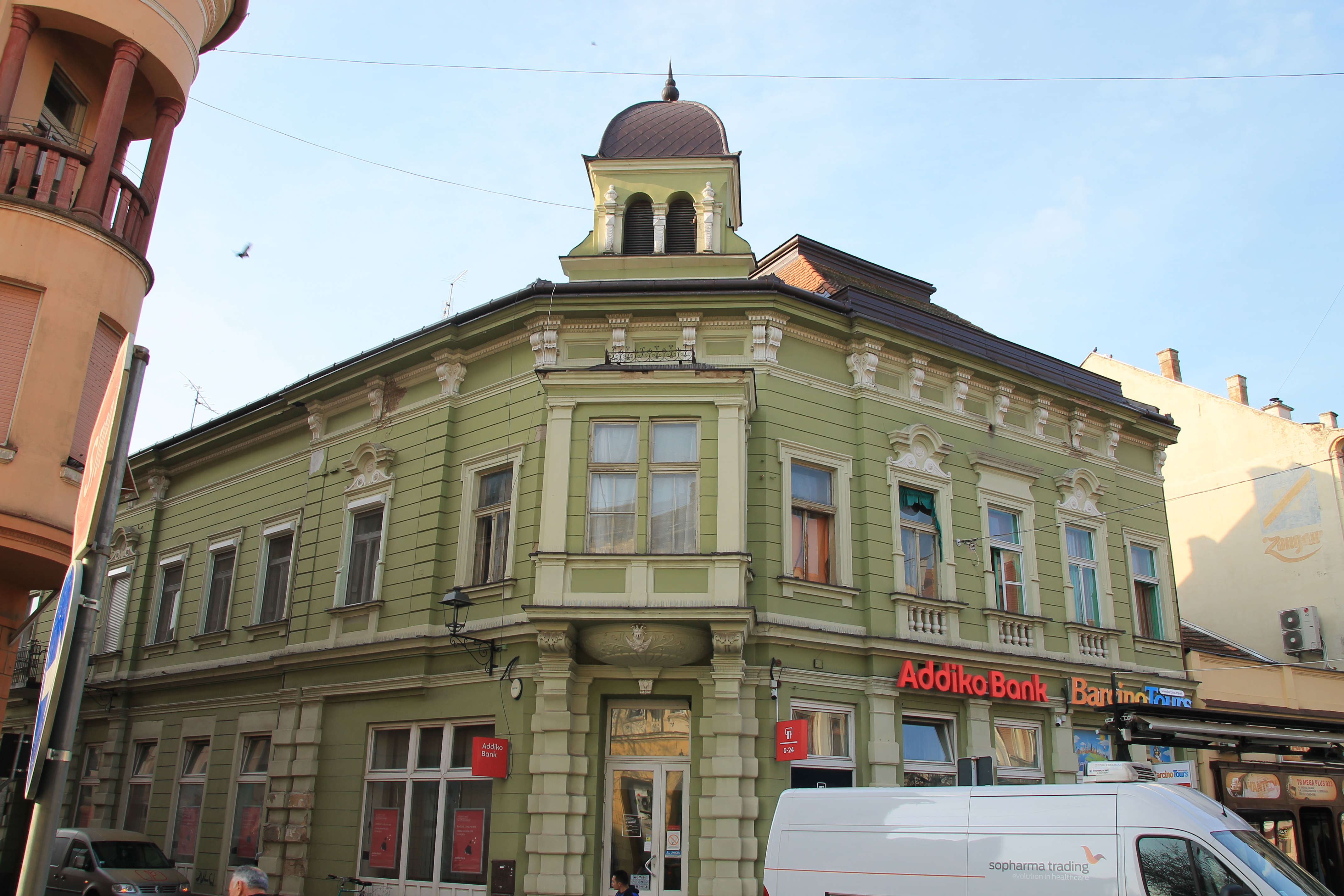 Staro jezgro Zrenjanina